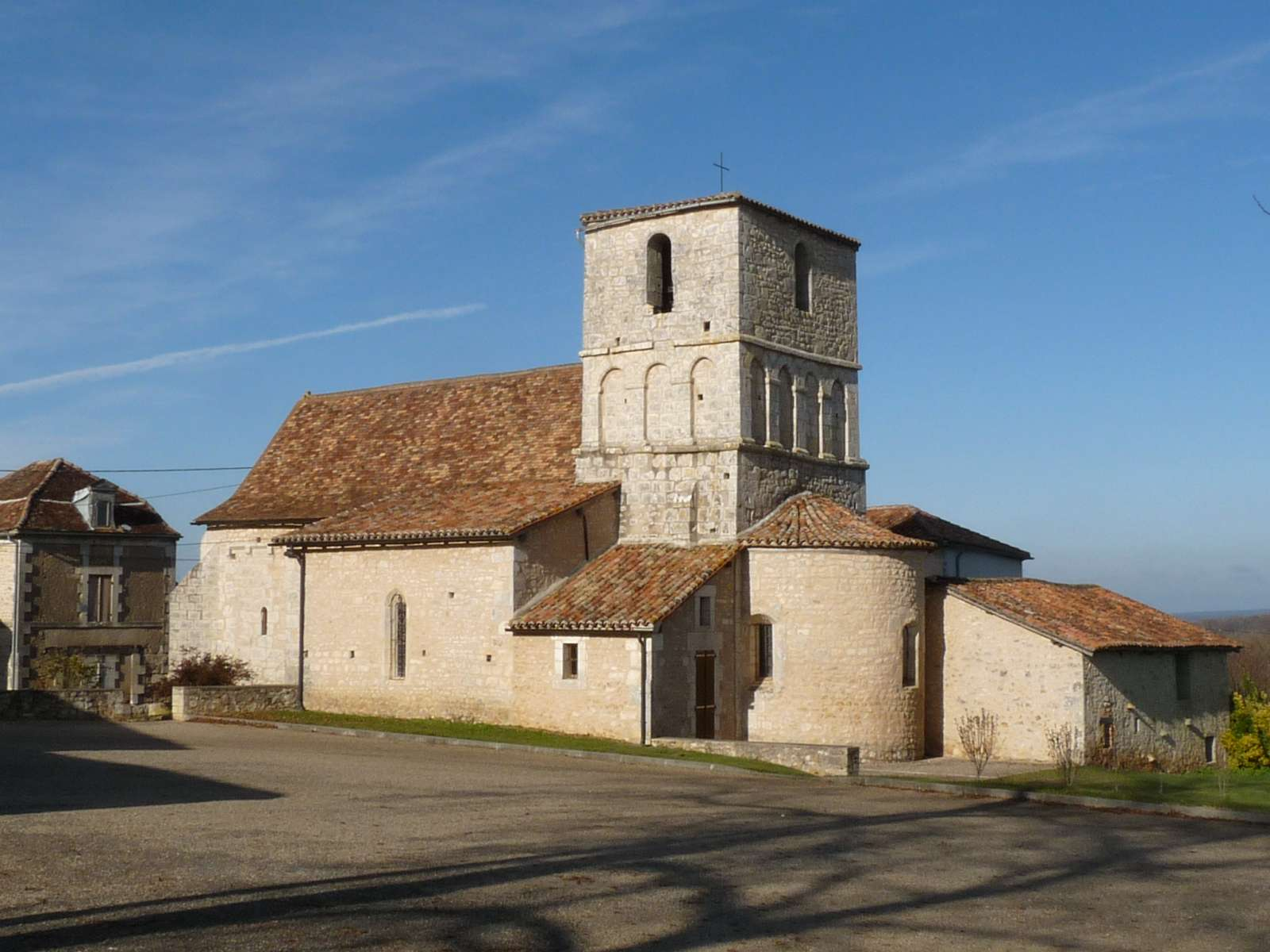 église d'Hautefaye, Dordogne, France; vue du sud-est